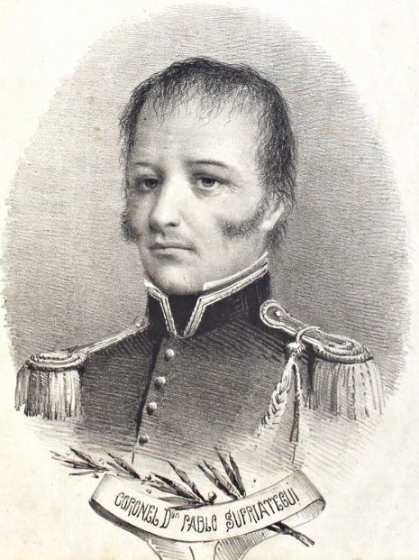 Pablo Zufriategui grabado aparecido en el número 62 de El Indiscreto el 6 de agosto de 1885